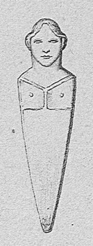 Corsu: Illustrazione di a stantara d'Apricciani, in a Storia illustrata di a Corsica, di prete Galletti.